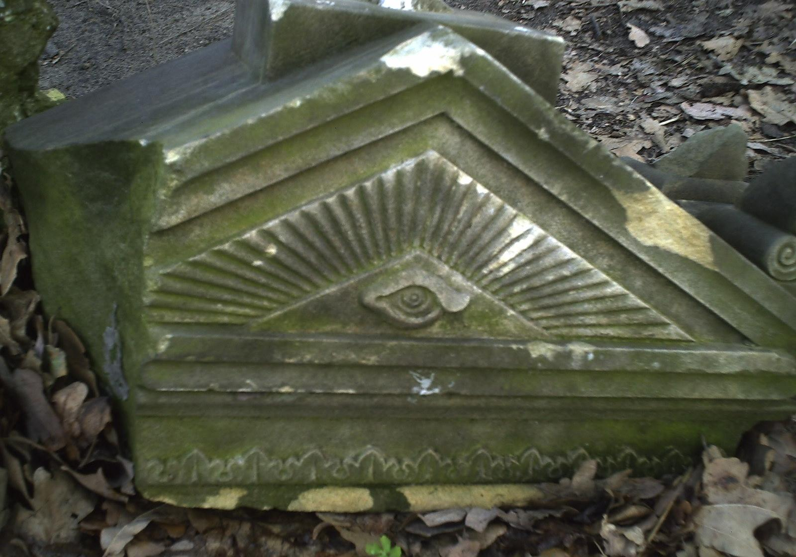 Dowód protestanckich wpływów w sakralnej sztuce żydowskiej - tzw. "oko opatrzności" na pozostałości macewy. Cmentarz żydowski w Skwierzynie (woj. lubuskie).